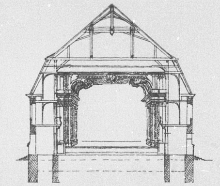 Schwetzinger Schloss, Entwurf Theater